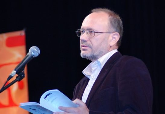 Fotografie von Peter Rychlo